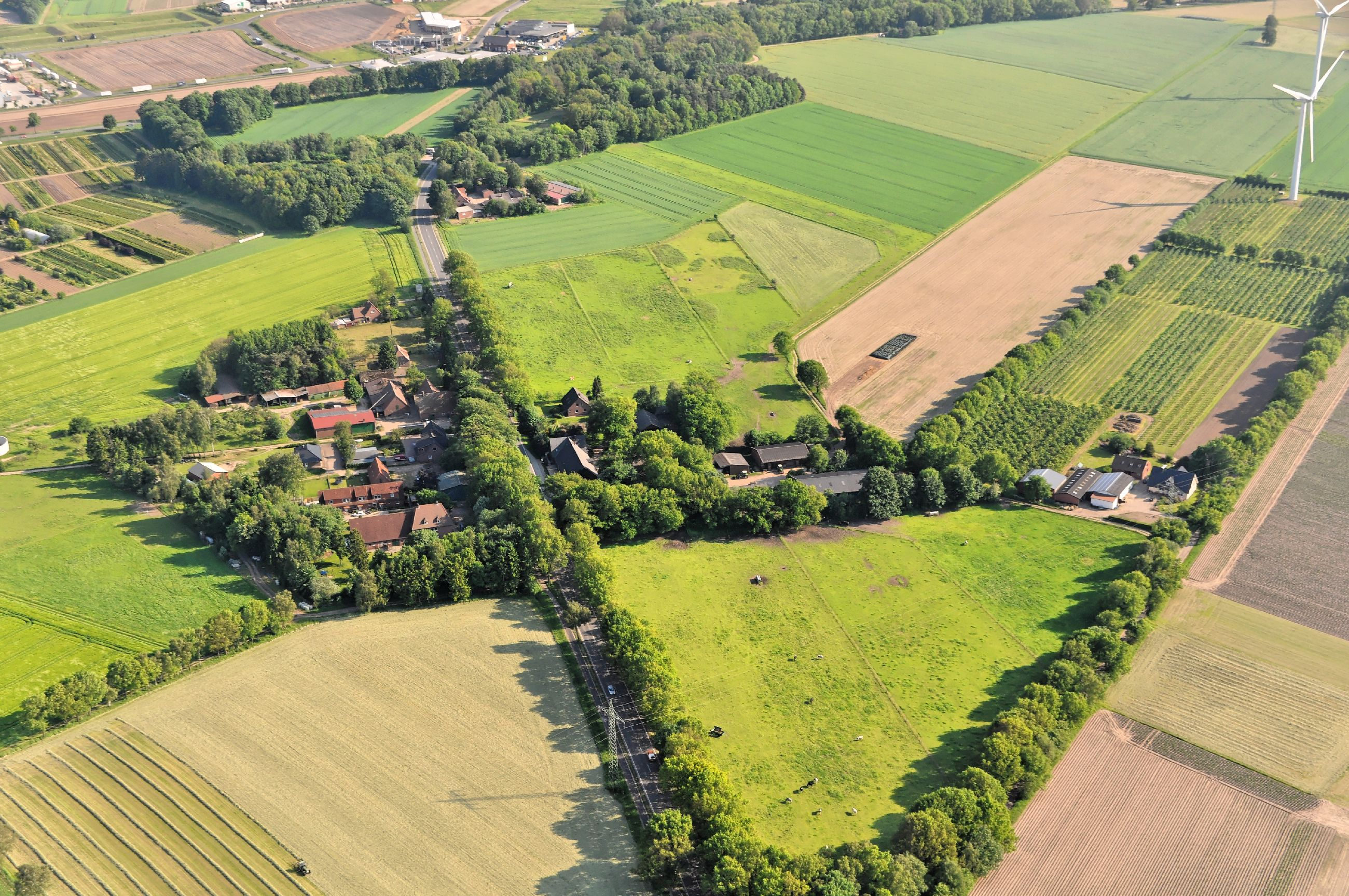 Überführungsflug vom Flugplatz Nordholz-Spieka über Lüneburg, Potsdam zum Flugplatz Schwarzheide-Schipkau